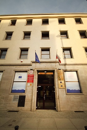 Dom Europy ul. Widok 10 50-052 WROCŁAW